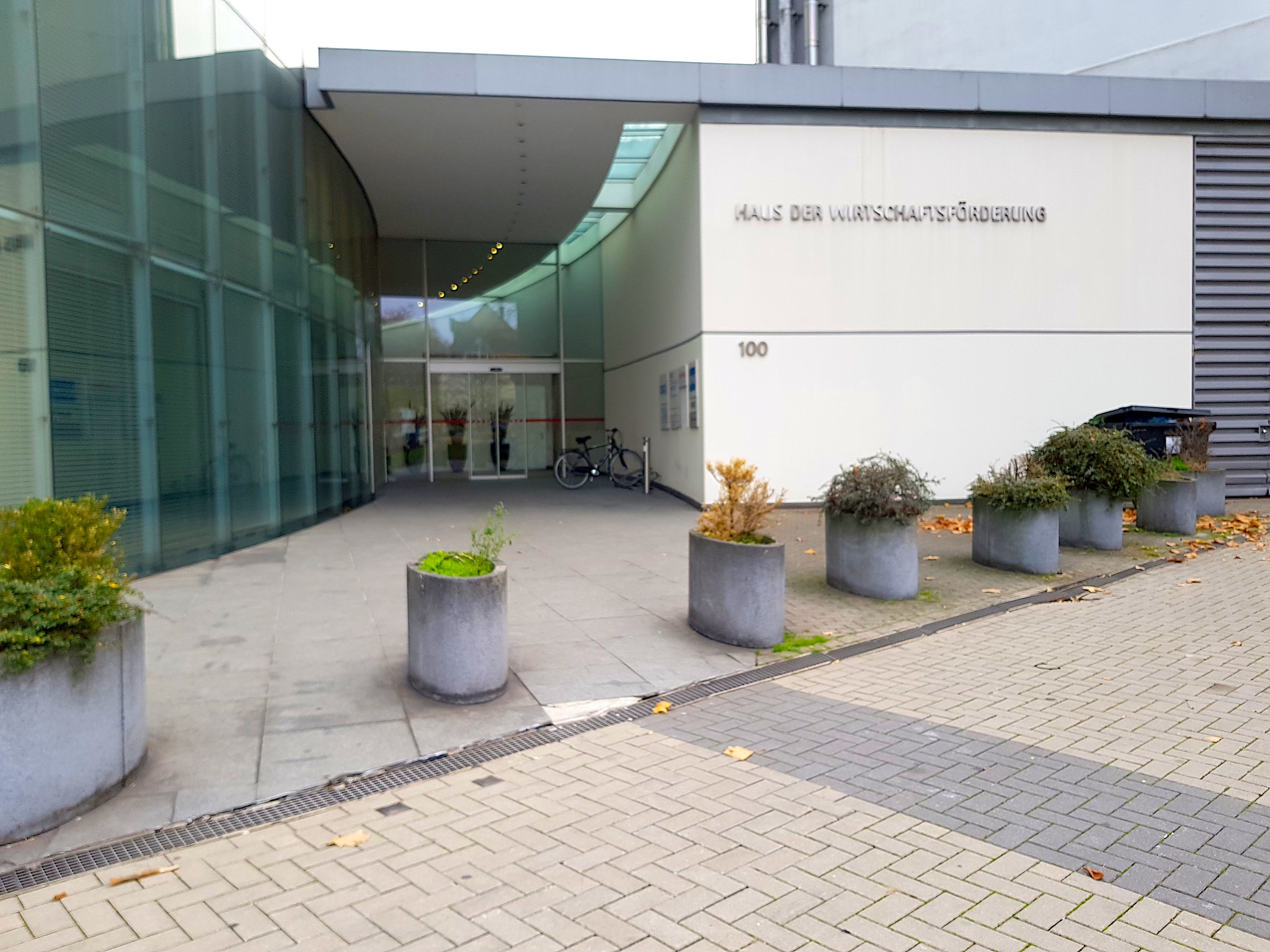 Stolpersteine Pappendster. 3, Duisburg-Neudorf